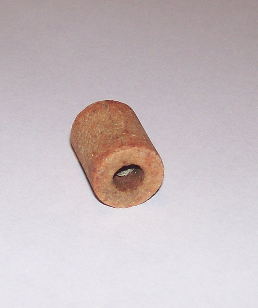 Description:Kostka awkwarystyczna. Author:Ewkaa